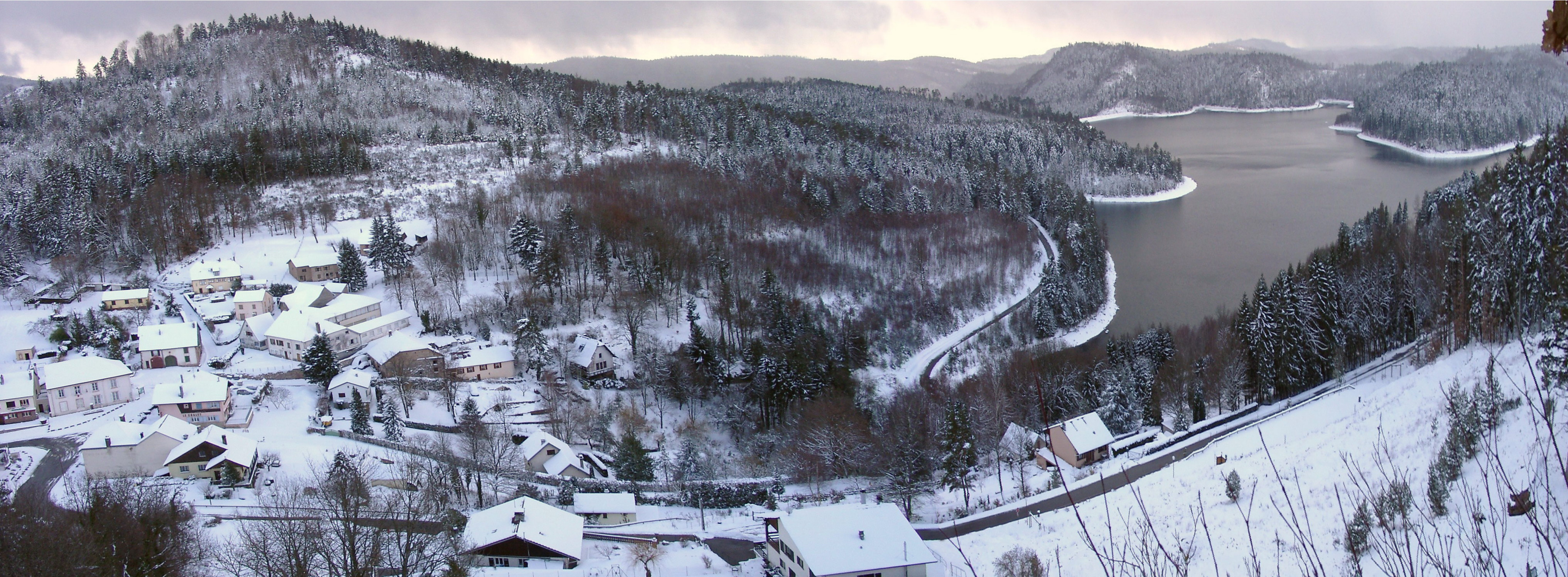 Pierre-Percée et le lac du Vieux Pré (Lorraine)